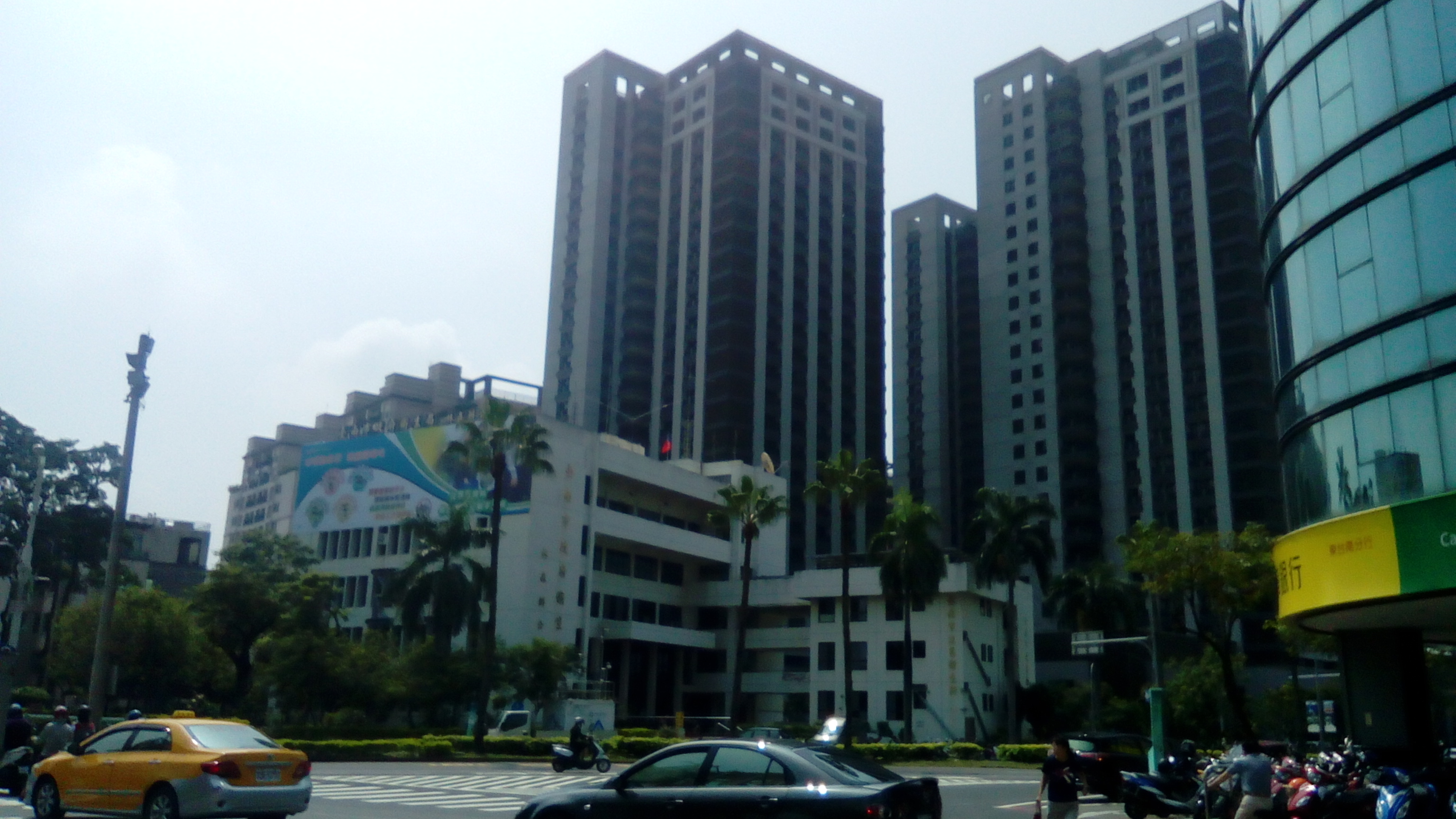 行政中心附近的高樓林立